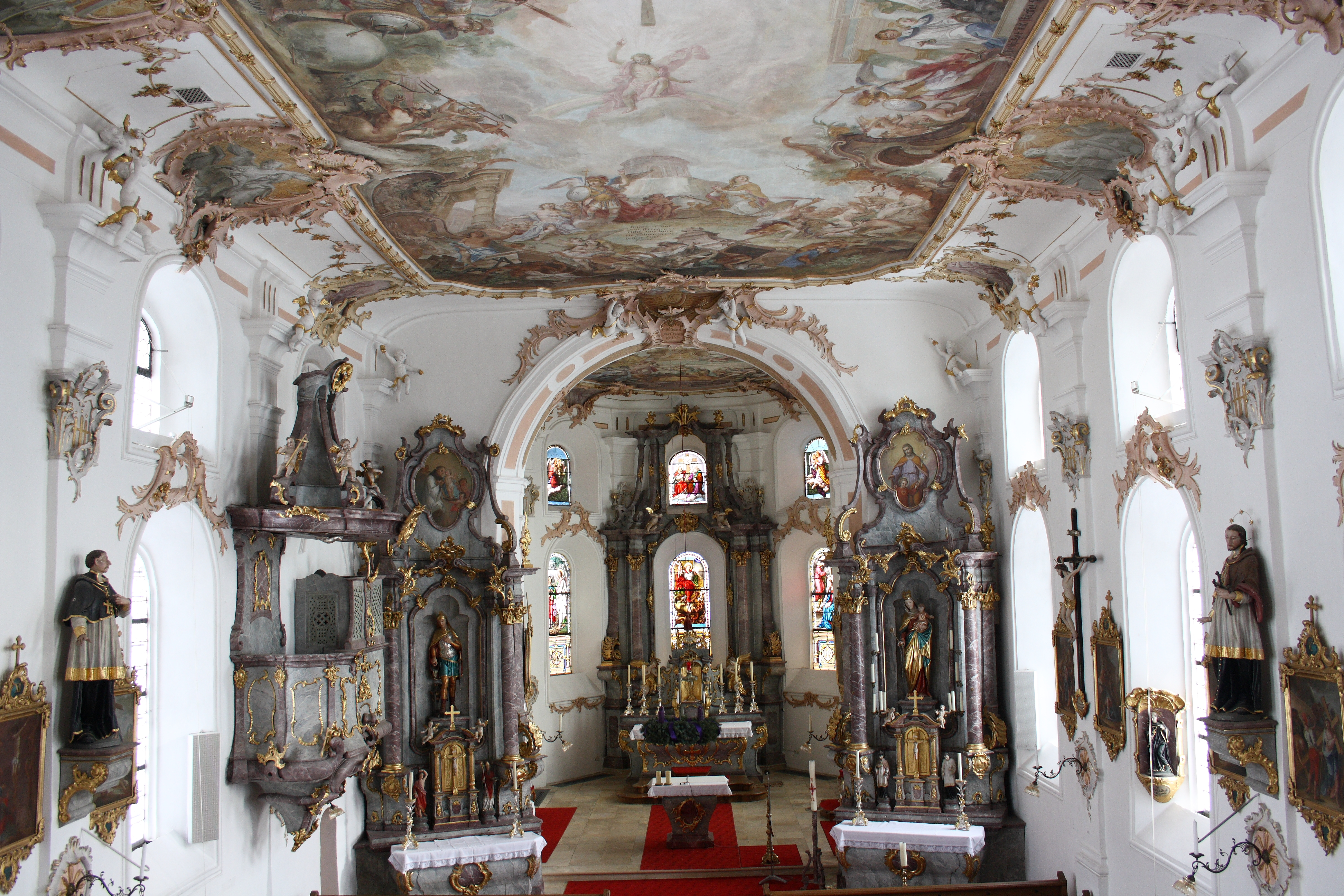 Katholische Pfarrkirche St. Michael in Lutzingen, einer Gemeinde im Landkreis Dillingen an der Donau (Bayern), Innenraum mit Blick zum Chor